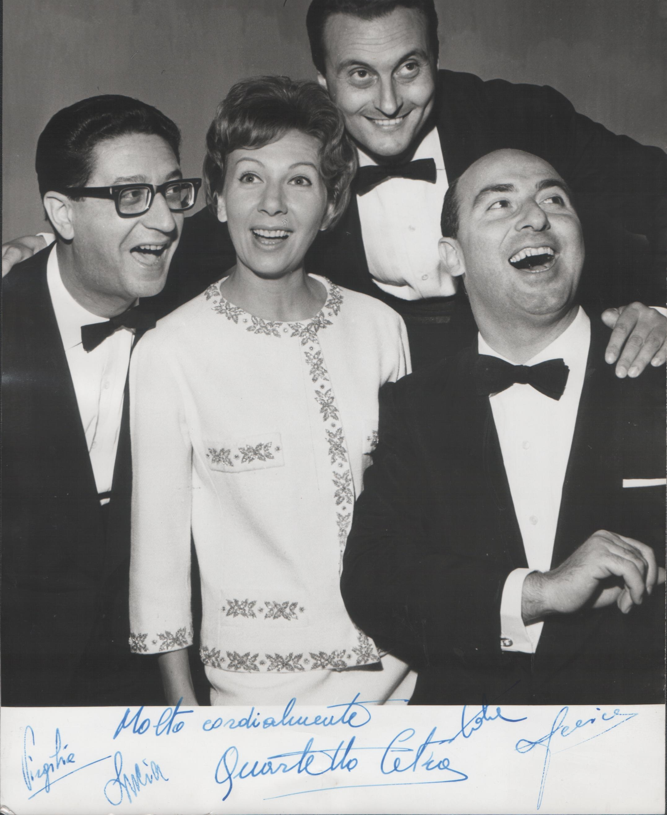 Quartetto Cetra (Italia), Kvartet Četra (Italija) u Beogradu. Sinonim uspona zabavnih i muzičkih programa italijanske tevizije pedesetih. Četiri decenije uspešne karije i popularnosti.